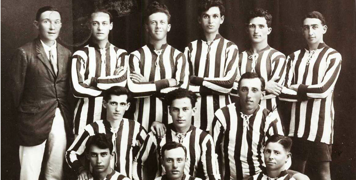 צילום קבוצתי של מכבי תל אביב 1921. זיהוי ע"פ הספר מכבי ת"א מאה שנים ראשונות: עומדים מימין: אפרים רובינשטיין, יוסף וילנצ'יק, שמעון לאומי, אייבי וילסון, מדנס. כורעים מימין: טיומקין גרינפלד קצב יושבים מימין: ברוך קושניר, מילו שמורק, אליעזר פולני